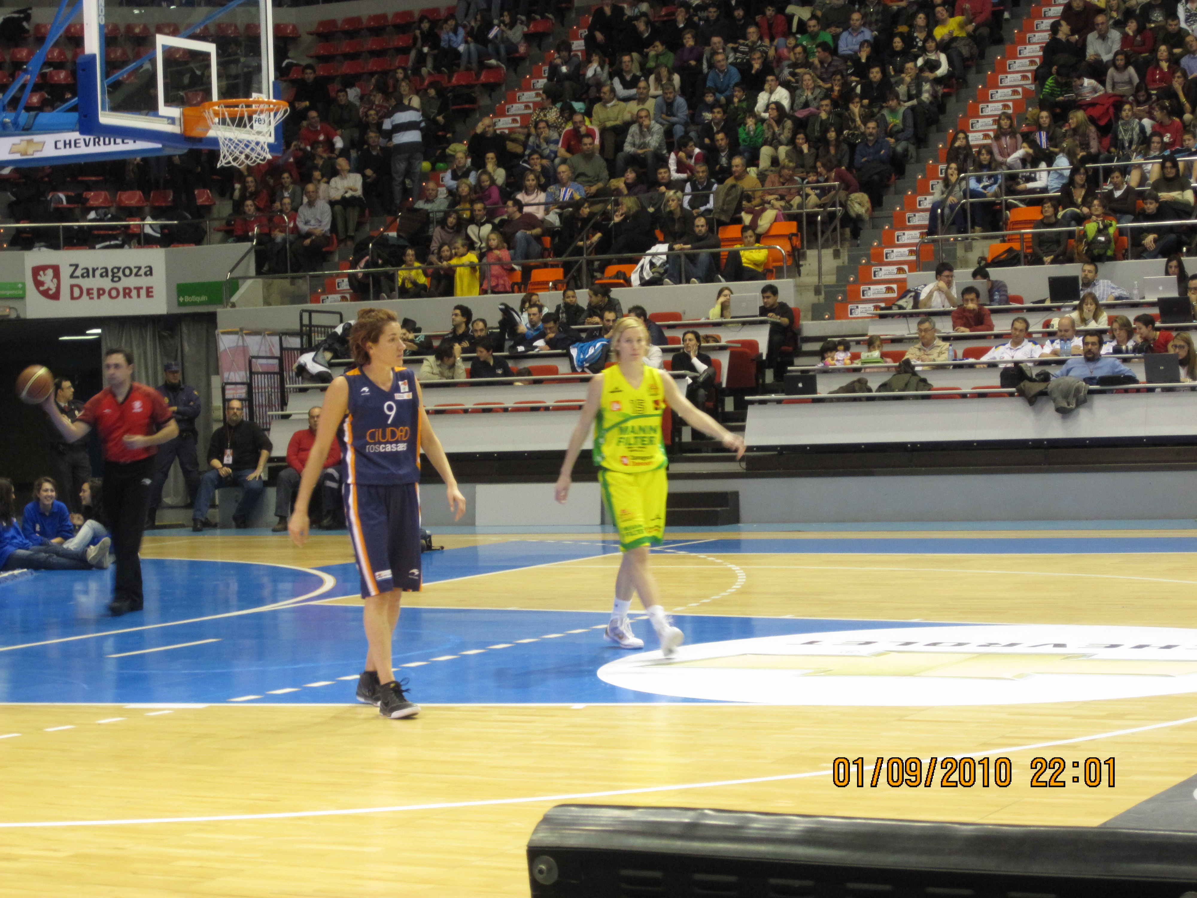 La jugadora de baloncesto española Laia Palau.